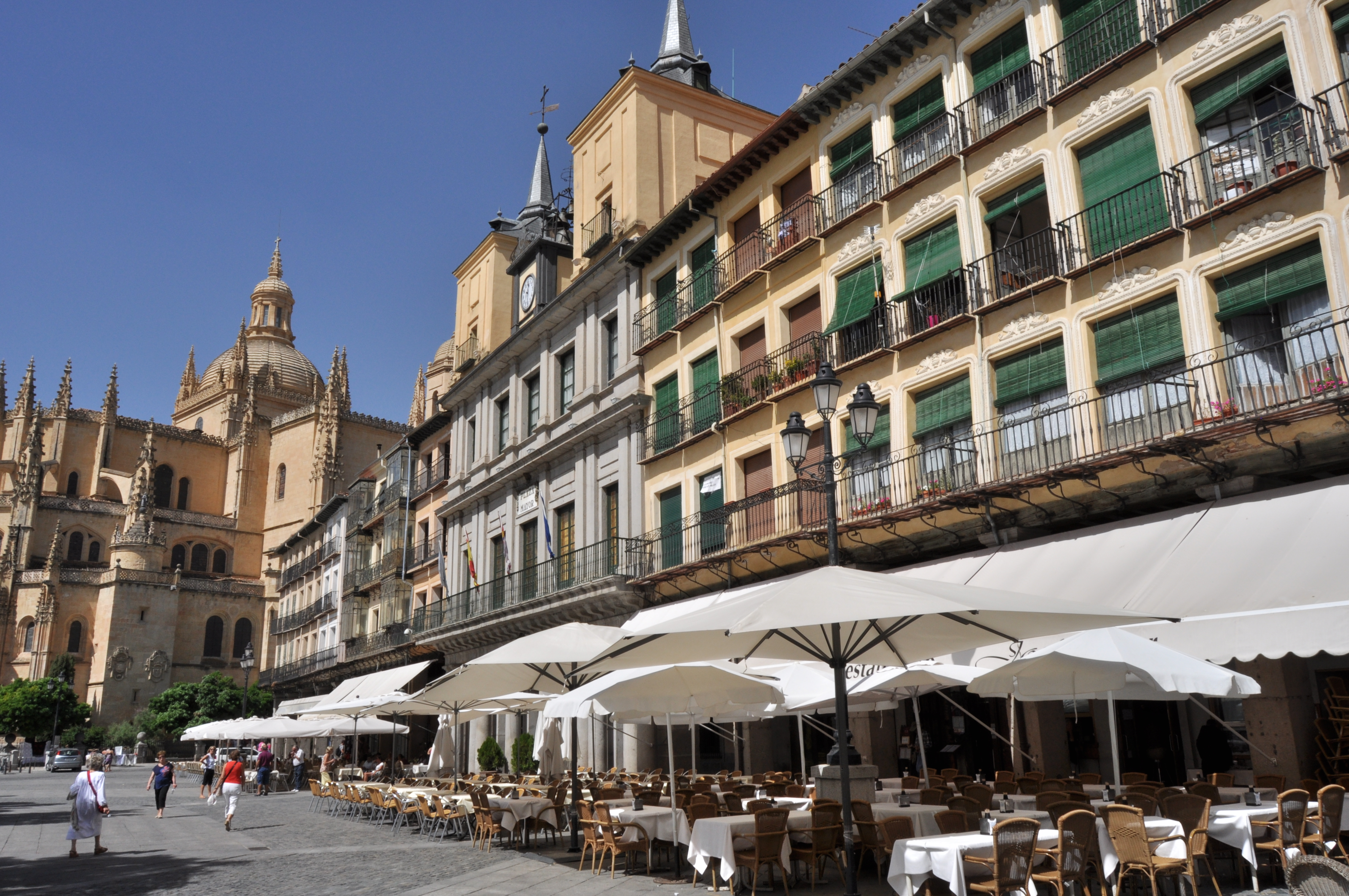 Segovia Capital - 133